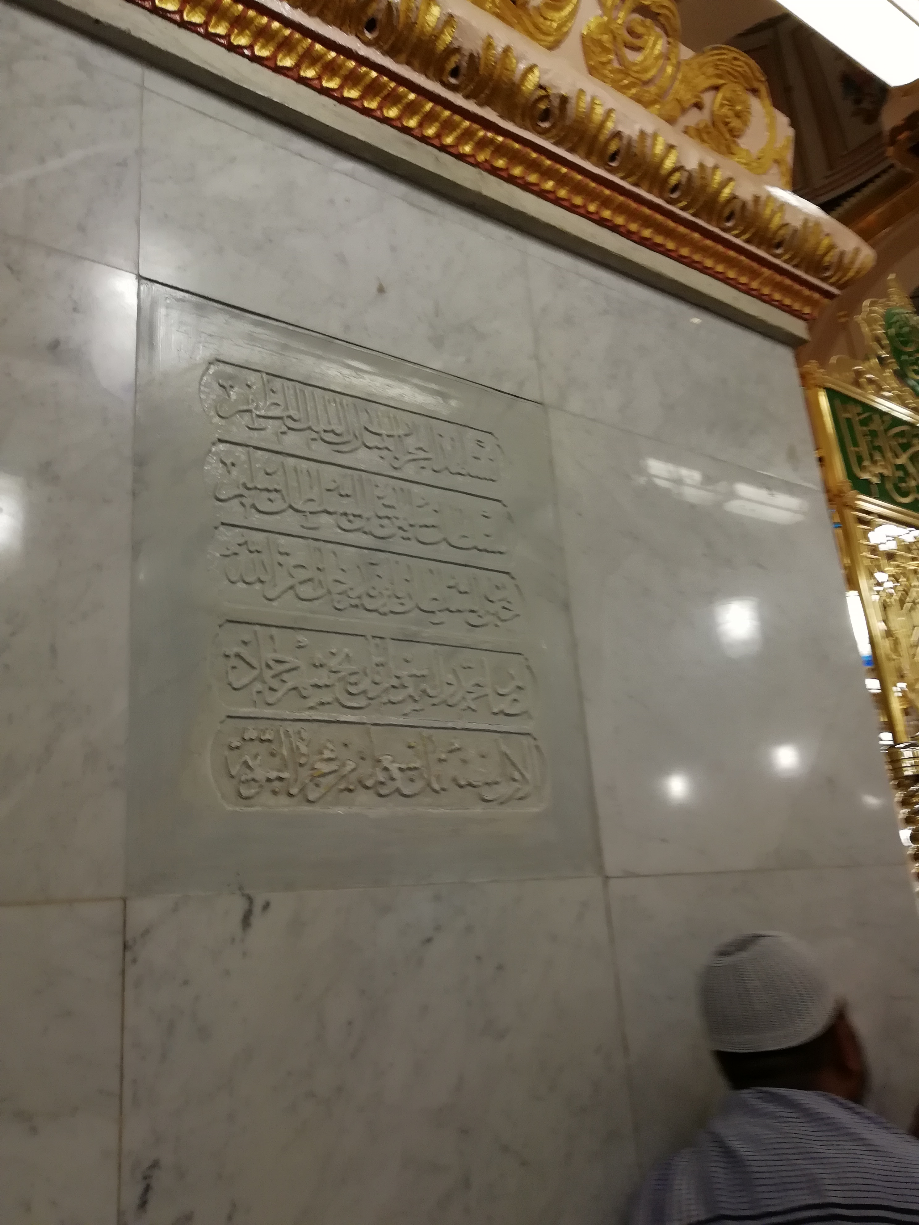 al-Madinah al-Munawarah Nabawi mosque Ottoman minbar